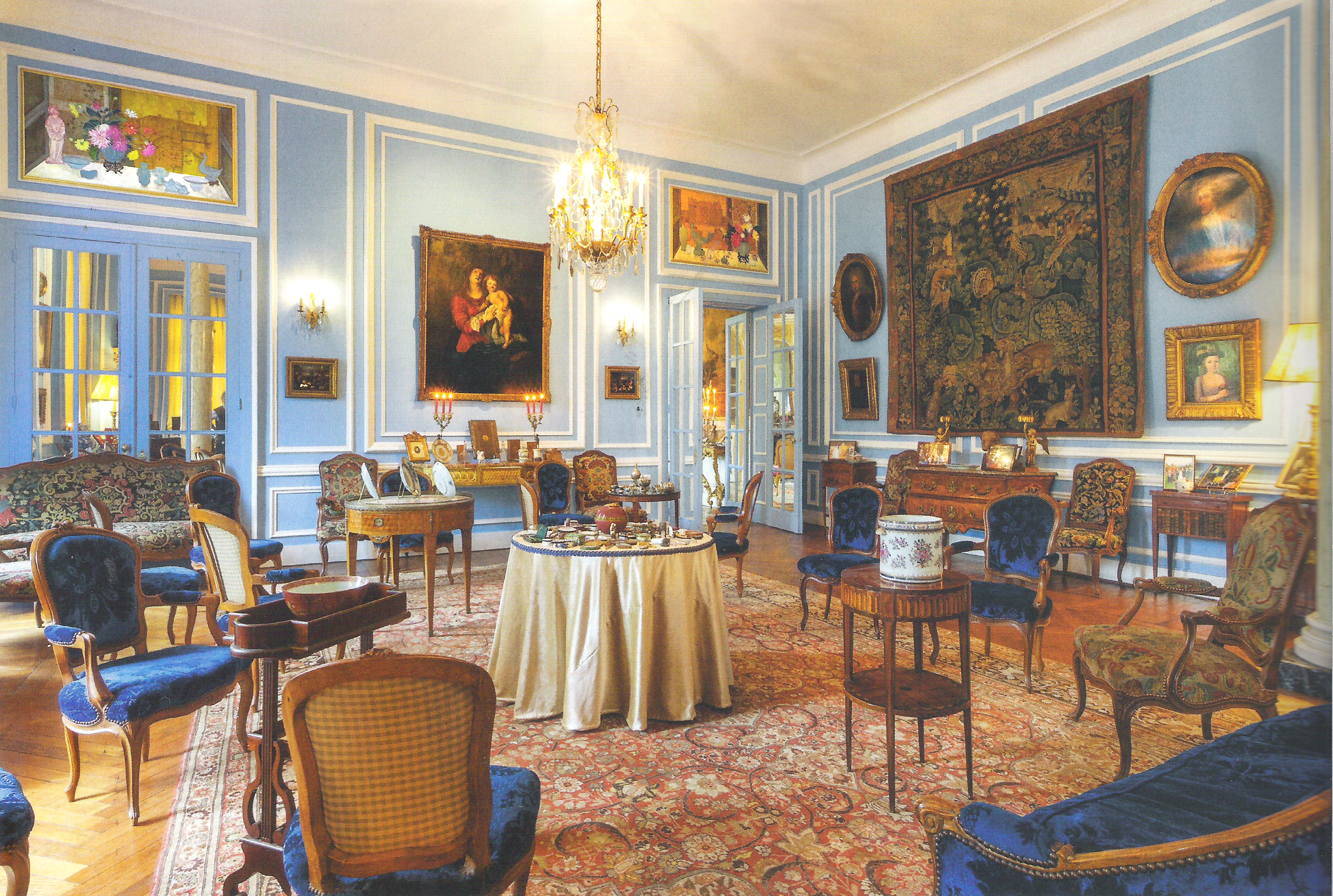 Chateau de la Grange, salon bleu. Résidence du Comte et de la Comtesse de Selancy